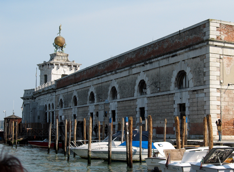 Venedig, Dogana da Mar, ehemaliger Zoll und Luxuswarenlager